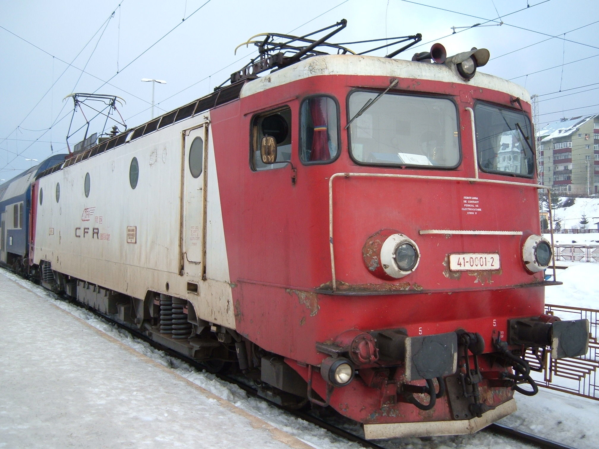 Locomotiva CFR clasa 41